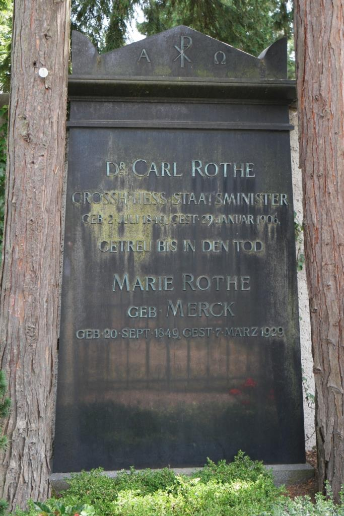 Grab des Verwaltungsbeamten und Politikers Carl Rothe (1840–1906) auf dem Alten Friedhof in Darmstadt.